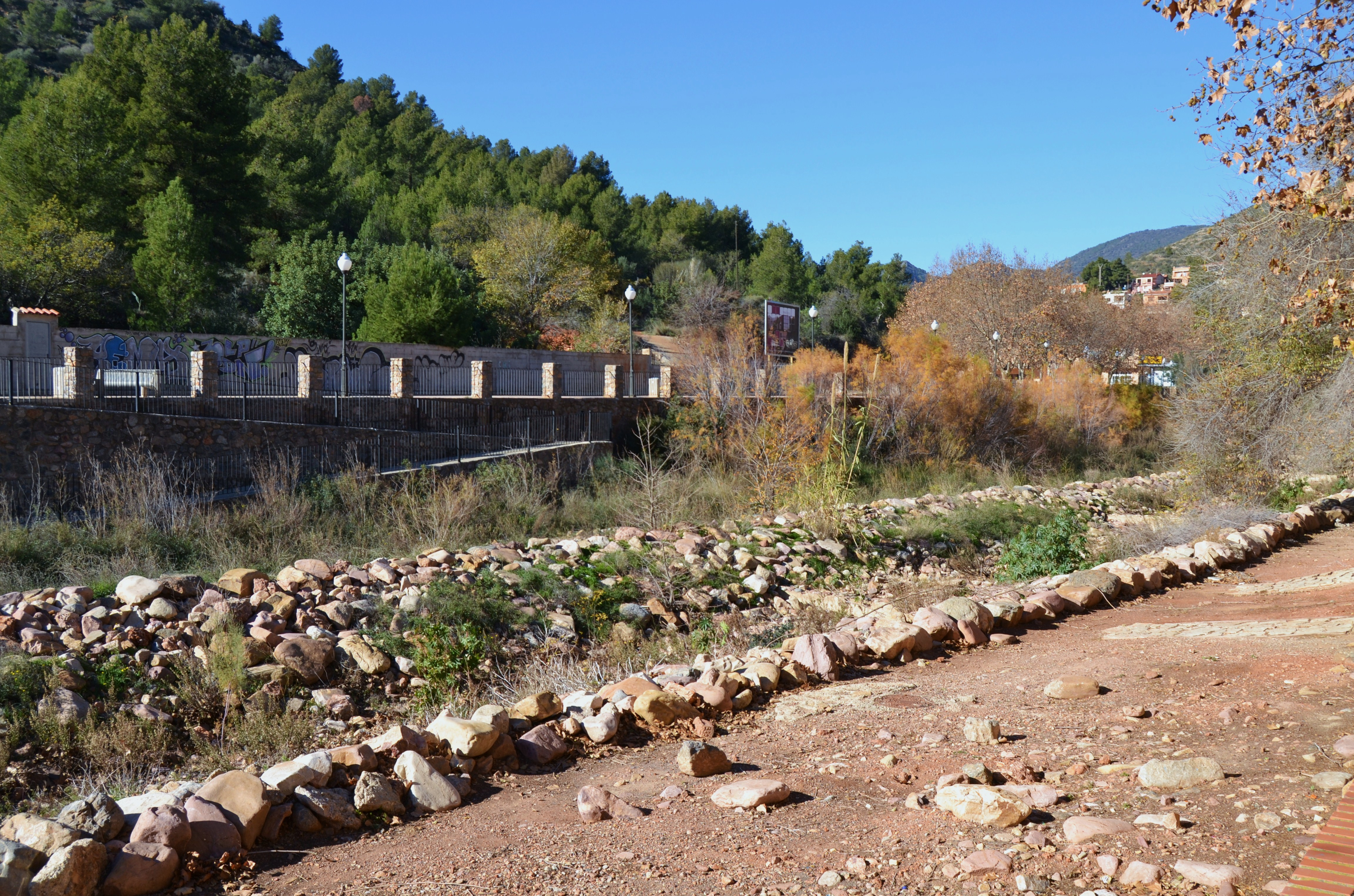 El riu Belcaire per les coves de sant Josep de la Vall d'Uixó.